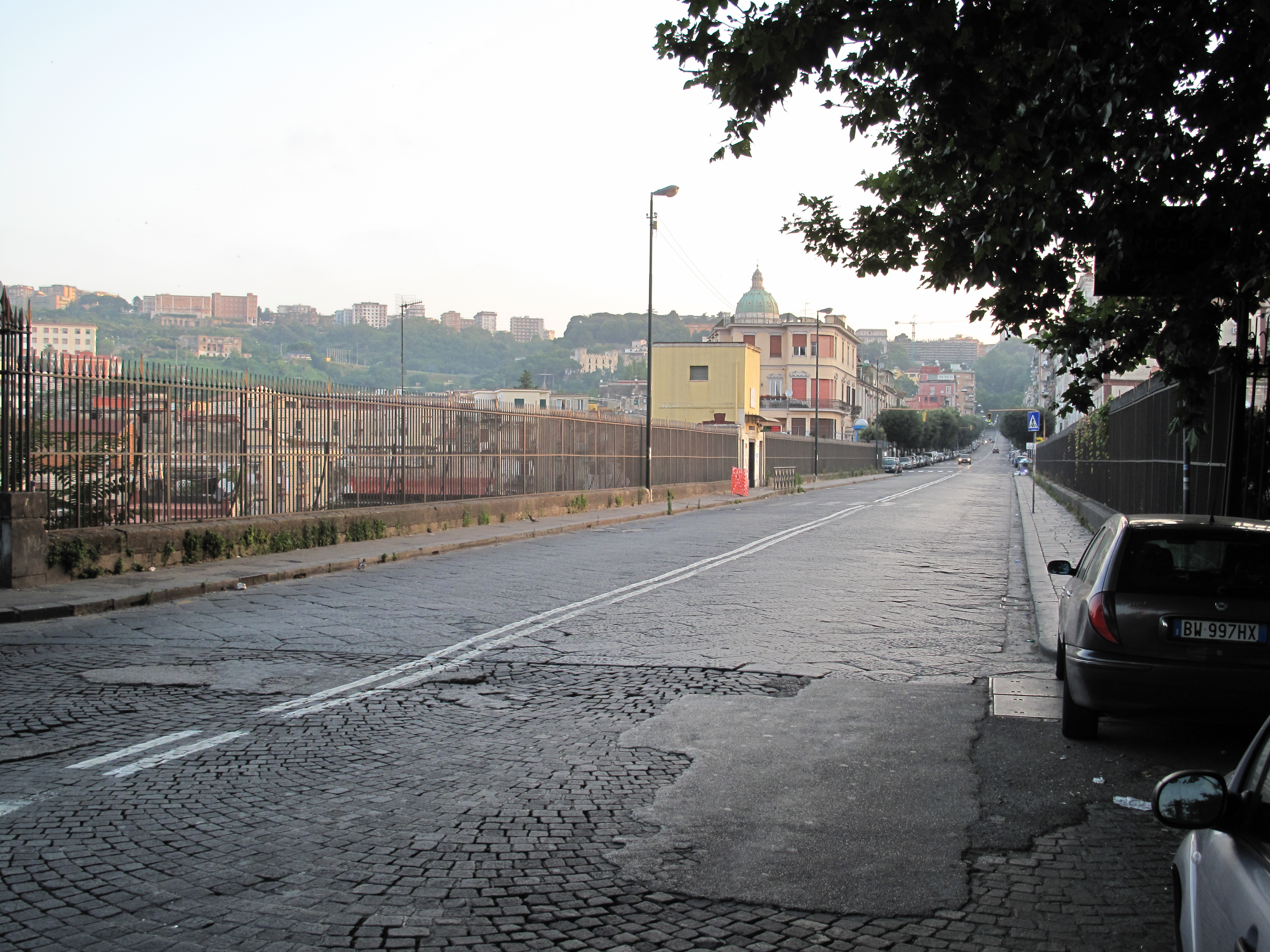 Il ponte della Sanità ripreso dall'emiciclo Capodimonte, dove termina via Santa Teresa degli Scalzi